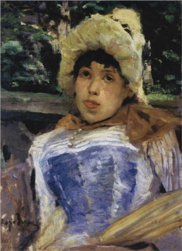 Портрет хористки 1883 Холст, масло Государственная Третьяковская галерея, Москва